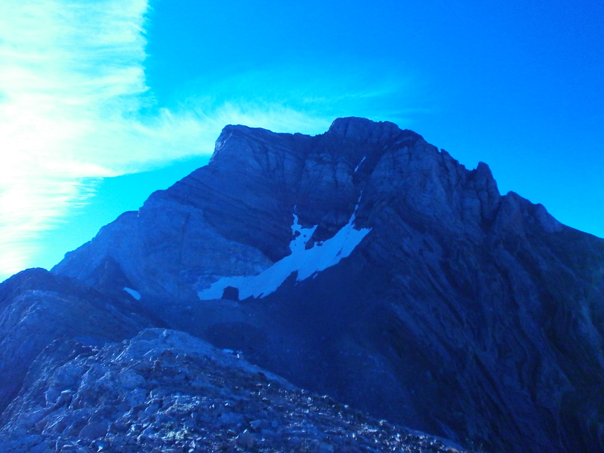 Pique Longue et Clot de la Hount